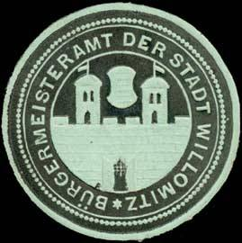 Sealing stamp Title: Bürgermeisteramt der Stadt Willomitz Description: schwarz, grün, geprägt Place: Willomitz/Böhmen size: 4 cm